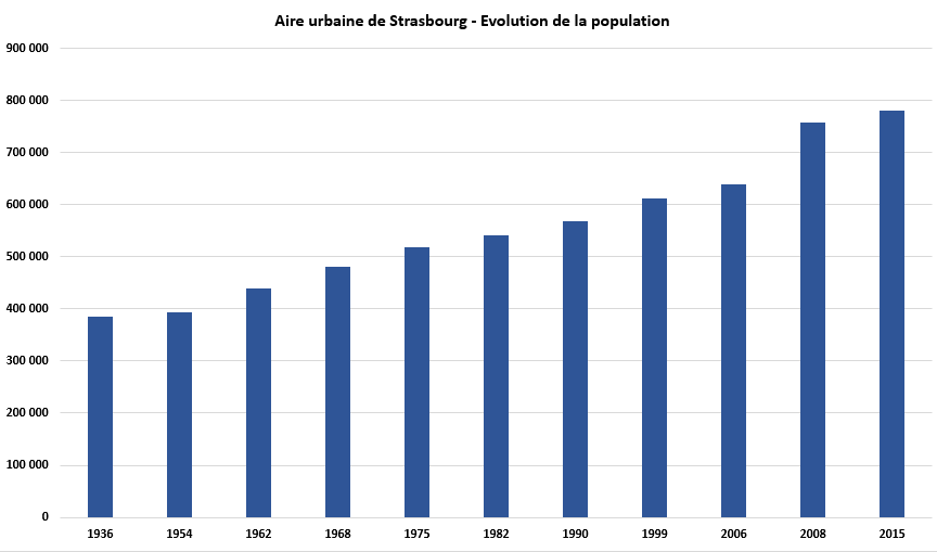 Graphique amélioré - Évolution de la population de l'aire urbaine de Strasbourg